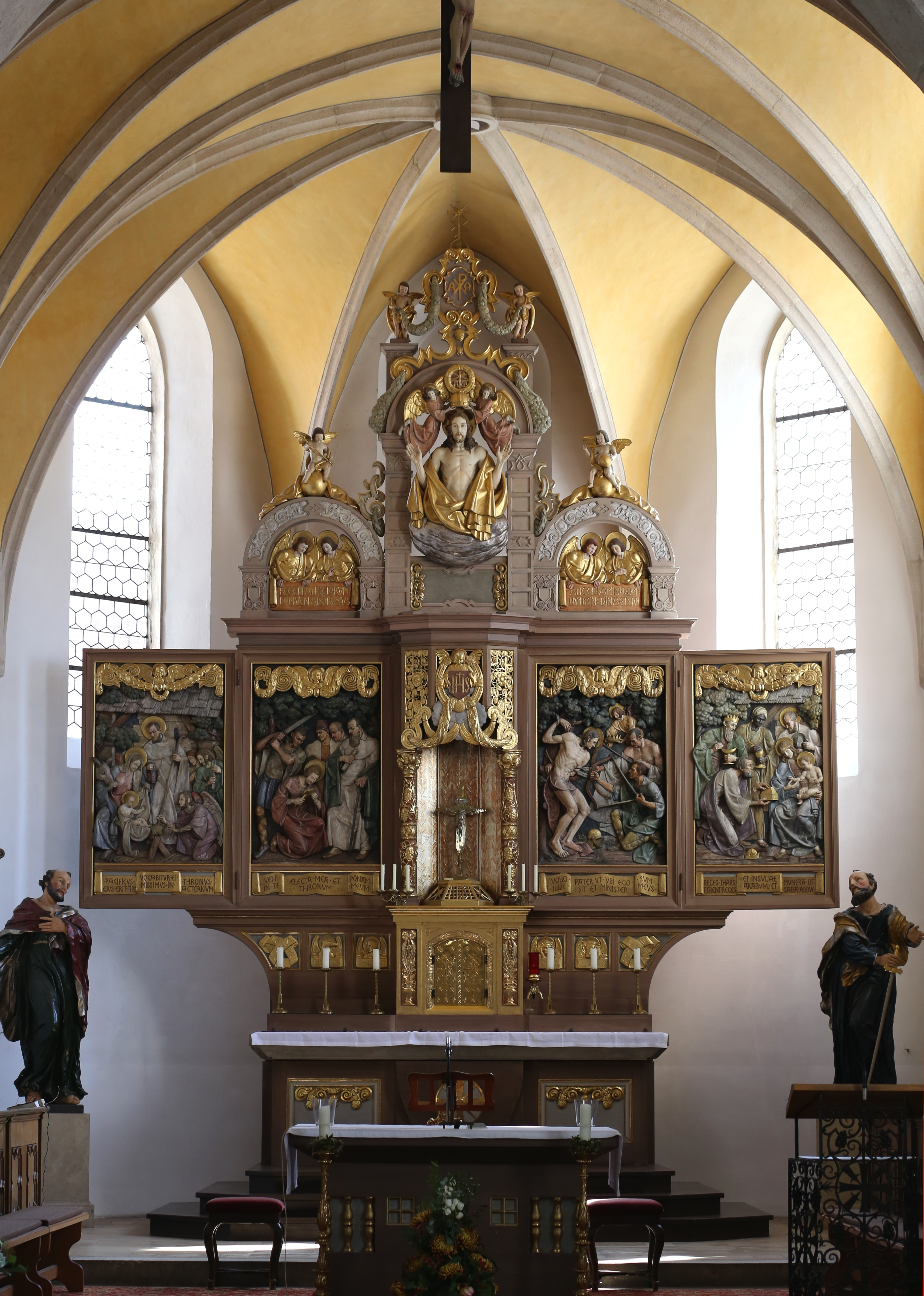 Barbaraplatz 1, Abensberg; Katholische Pfarrkirche St. Barbara, dreischiffige Hallenkirche, zweite Hälfte 15. Jahrhundert, Turmaufbau barock, 1762